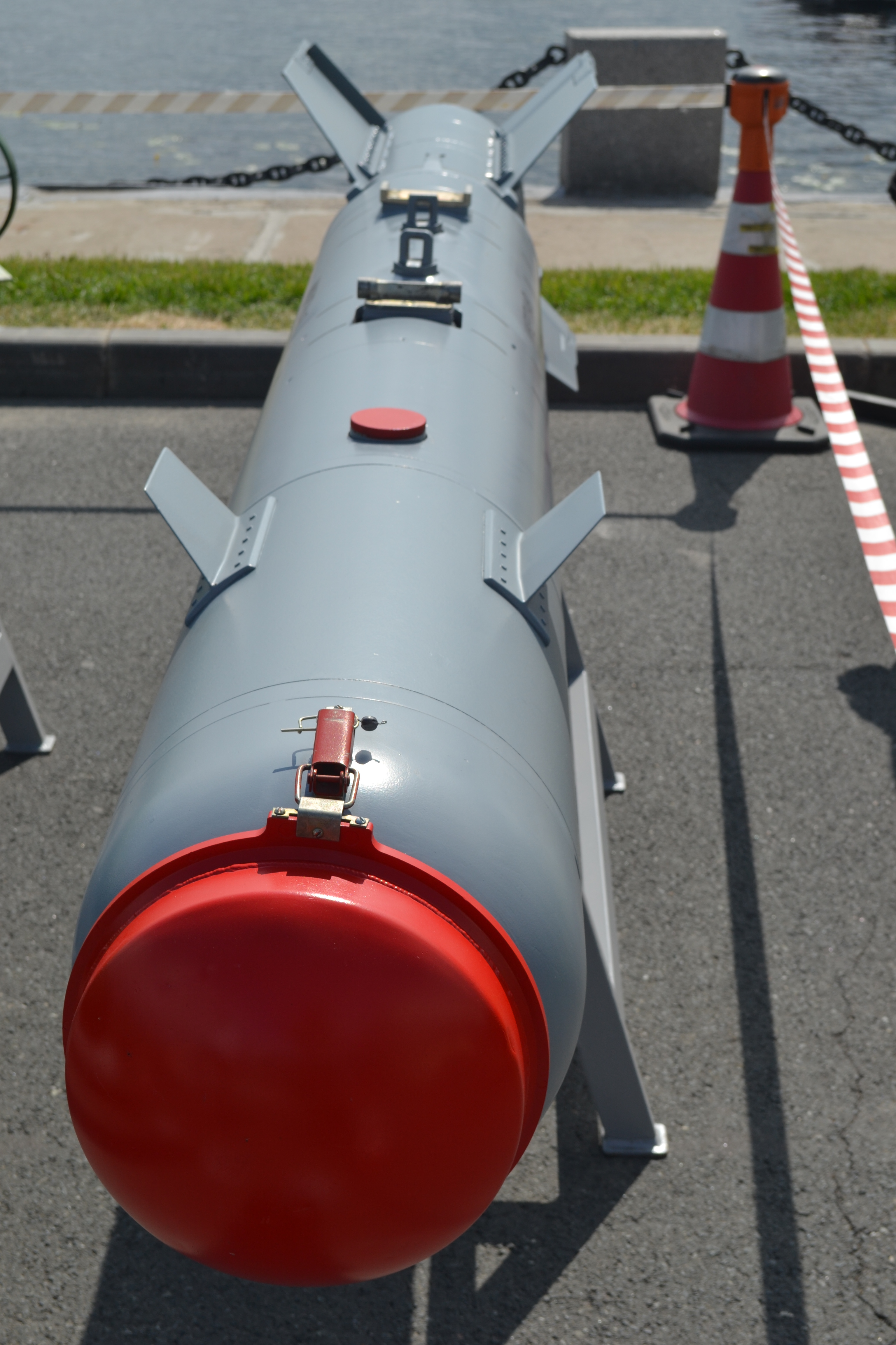 Корректируемая авиабомба калибра 500 килограмм с бетонобойной боевой частью КАБ-500ОД на МВМС-2013